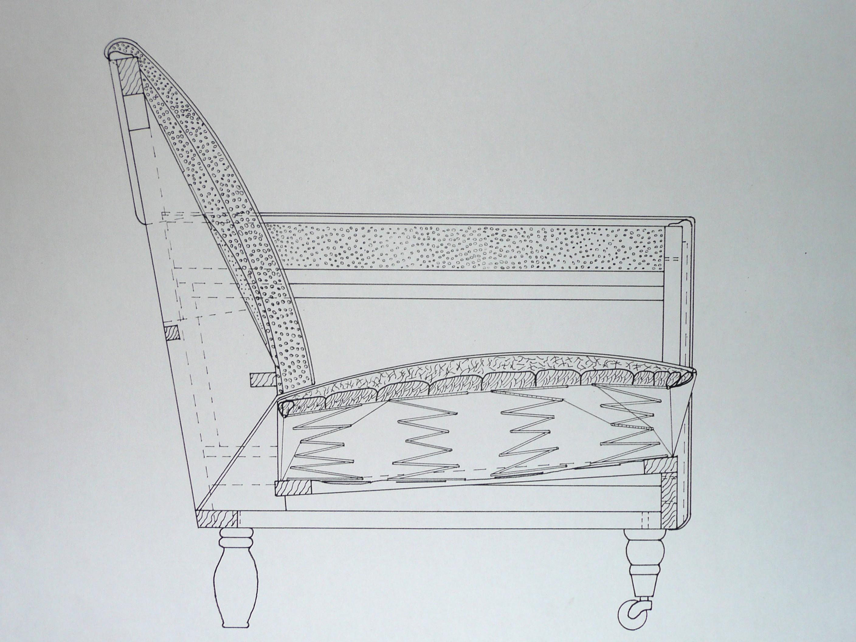 Technisch gezeichneter Querschnitt eines klassisch gepolsterten Sessels.